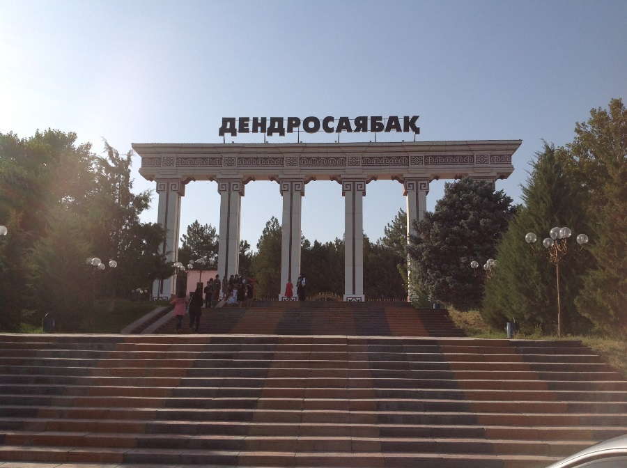 Шымкент қаласындағы Дендросаябақ